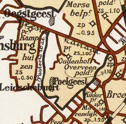 Oudenhof